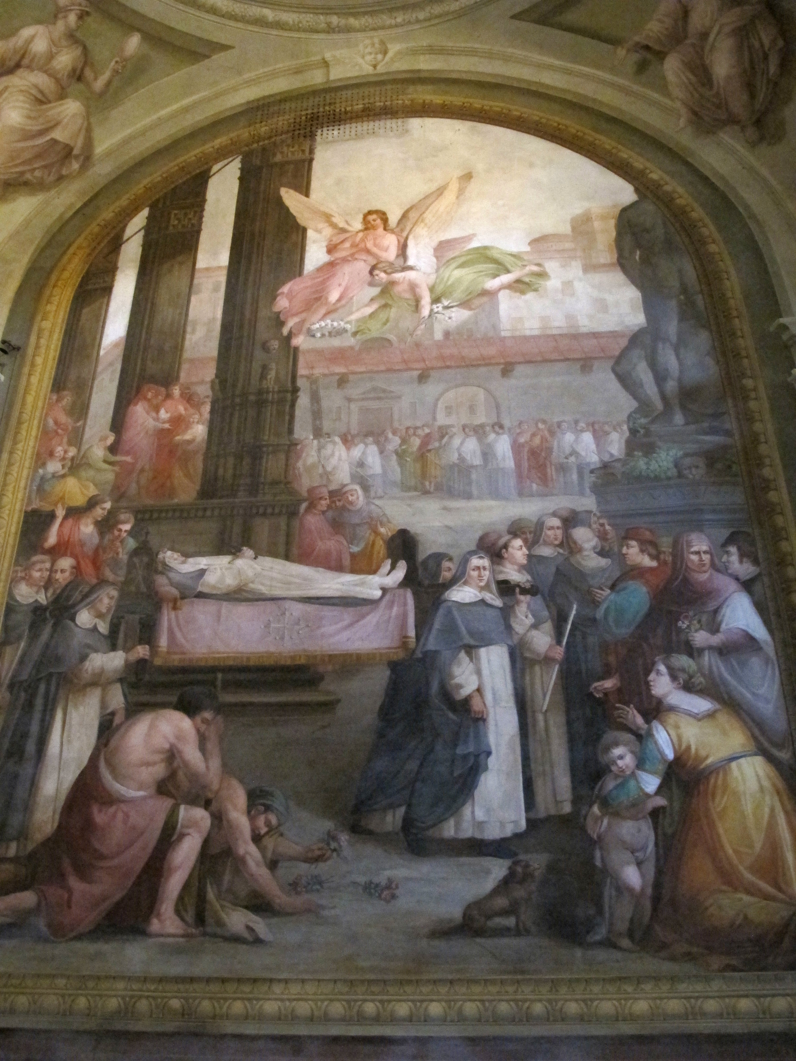 Santa Maria Maddalena de' Pazzi, Firenze